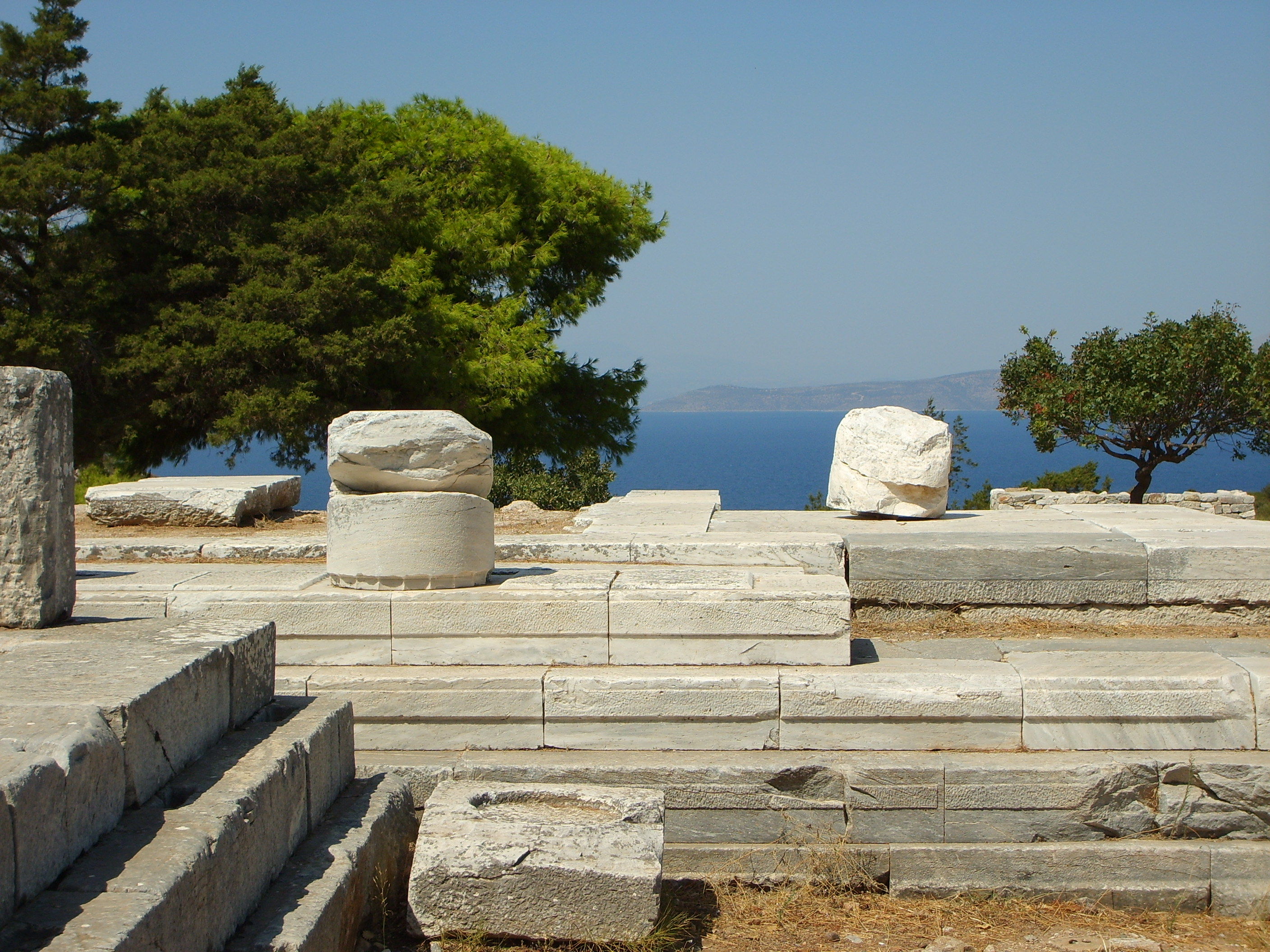 Temple de Némésis (Ramnous, Grèce)